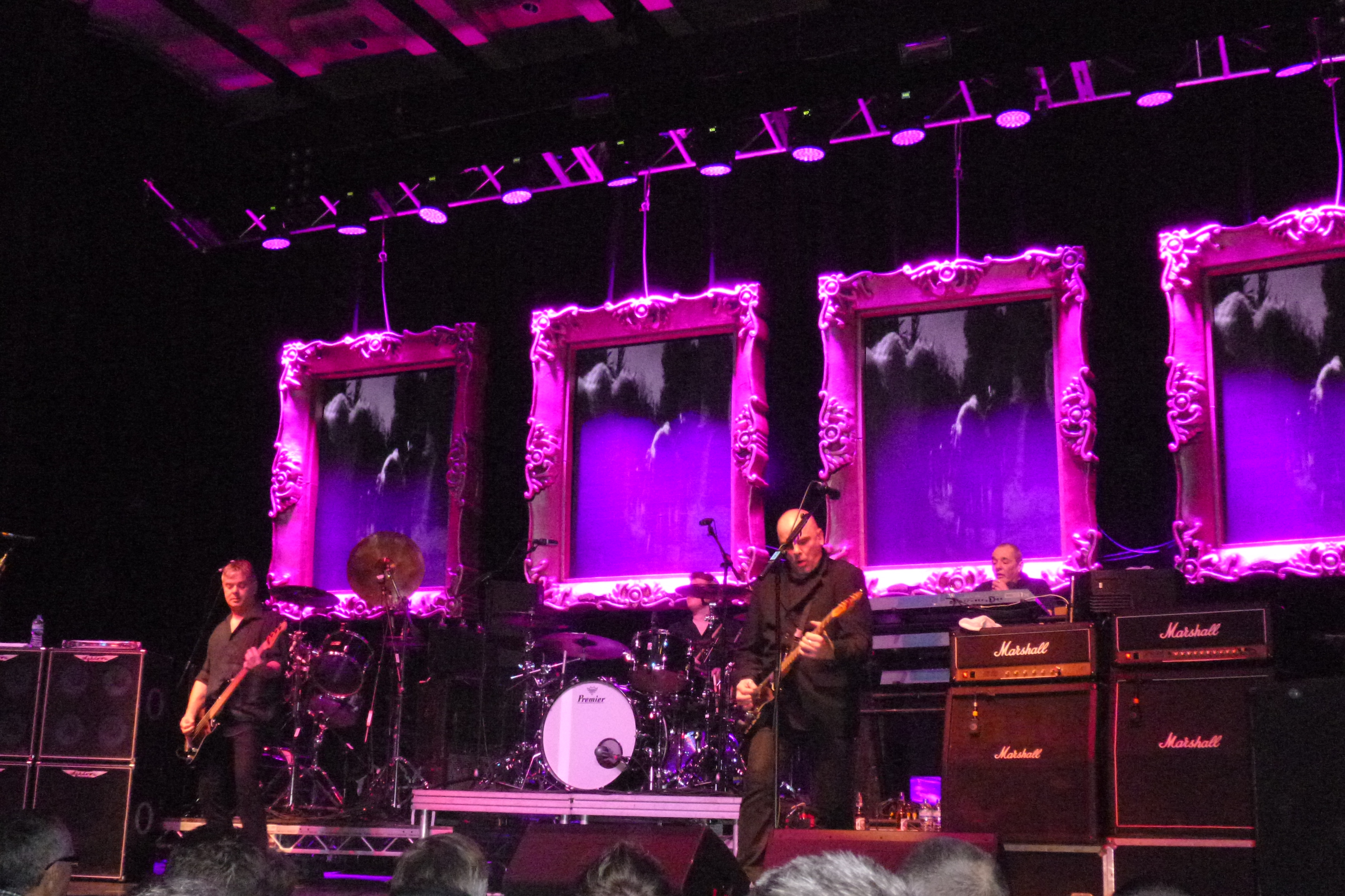 The Stranglers w Brighton 2014-03-06